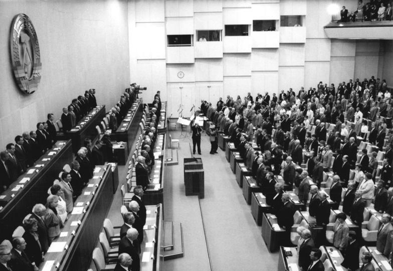 ADN-ZB Settnik 1.9.1989 Berlin: 50. Jahrestag Beginn des 2. Weltkrieges Mit einer außerordentlichen Plenartagung ehrten Abgeordnete der obersten Volksvertretung der DDR die über 50 Millionen Opfer der faschistischen Barbarei.